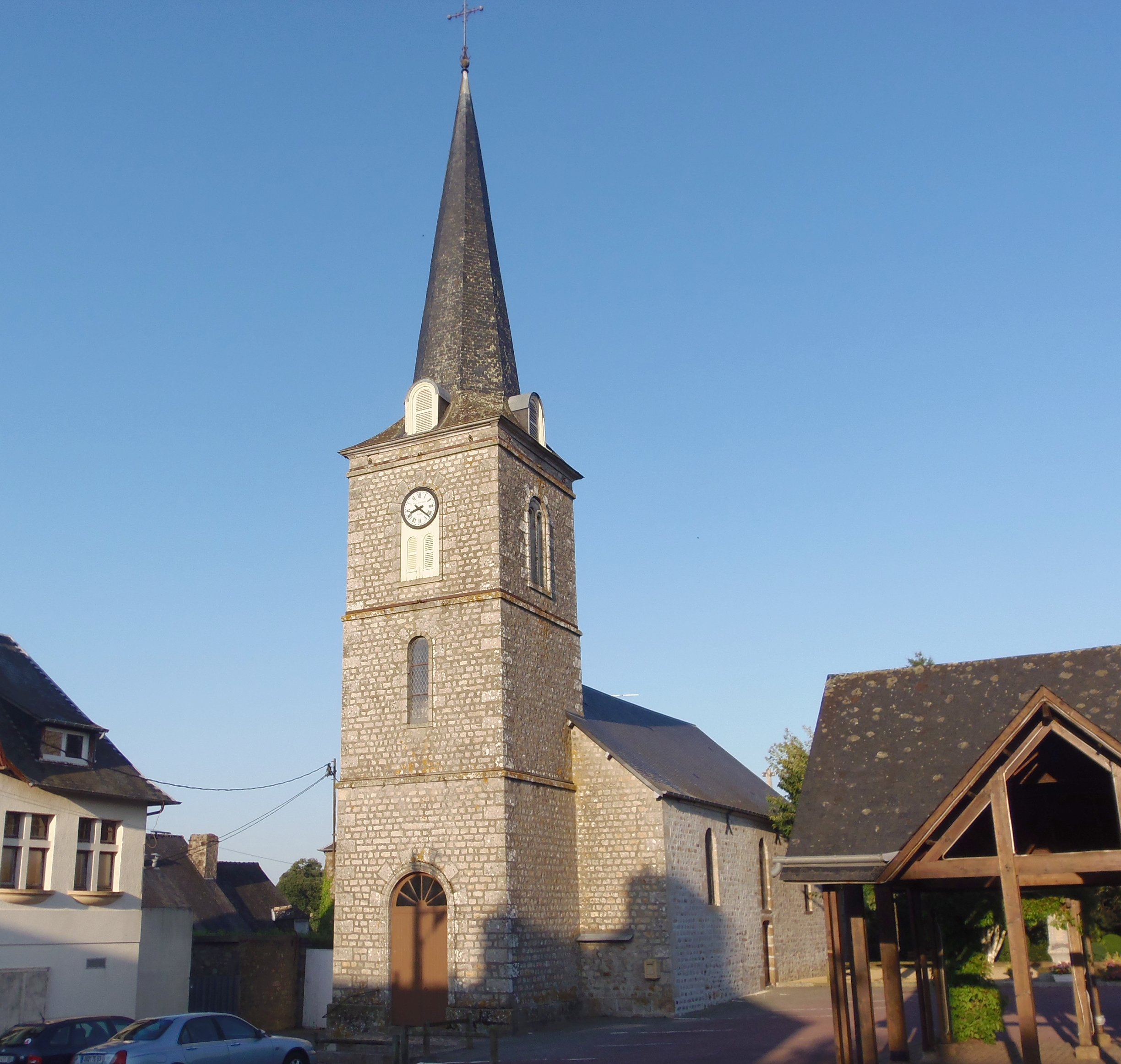 La Pallu (Pays de la Loire, France). L'église Saint-Sulpice.